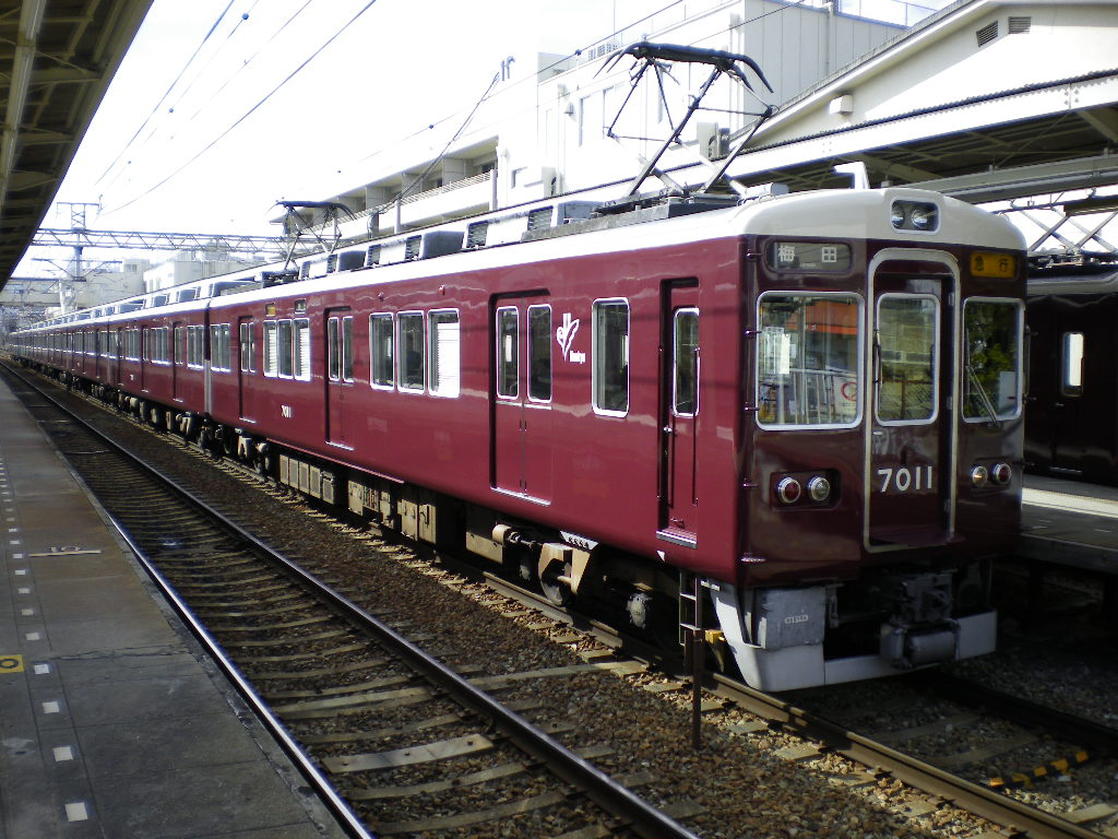 側扉の縦の銀帯がない7011F